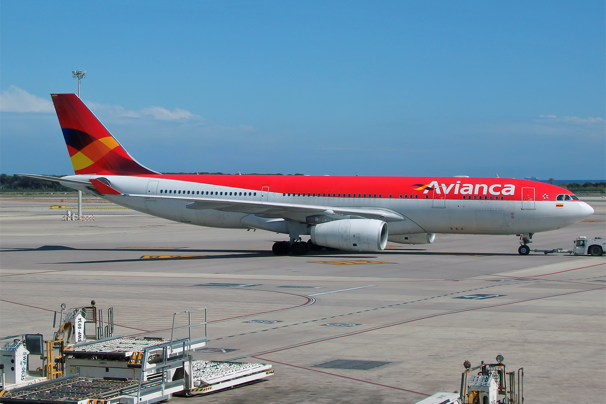 Avianca, N974AV, Airbus A330-243